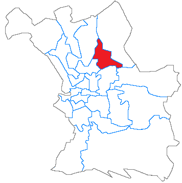 Situation du canton dans la ville de Marseille